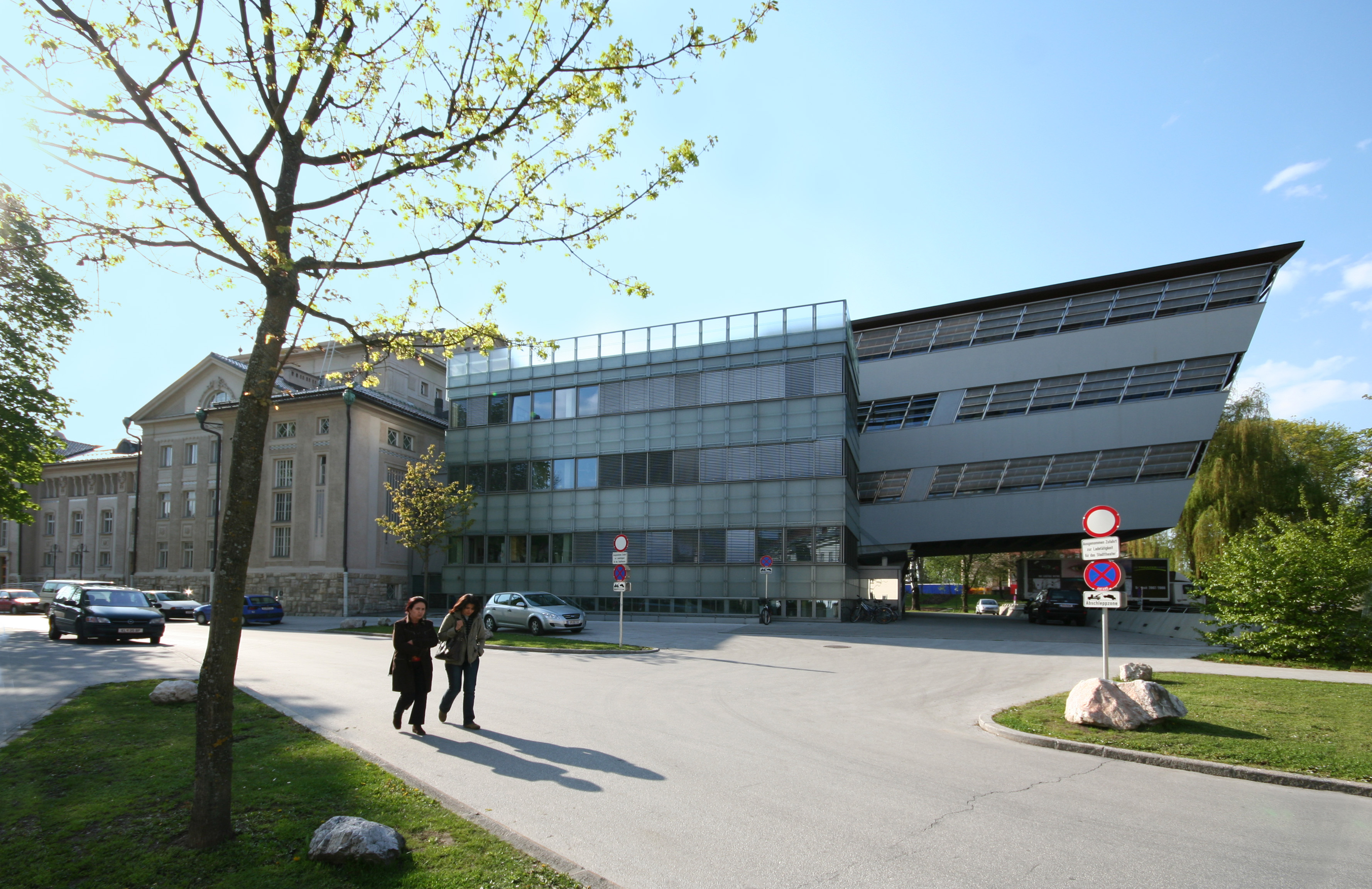 Stadttheater Klagenfurt mit Zubau